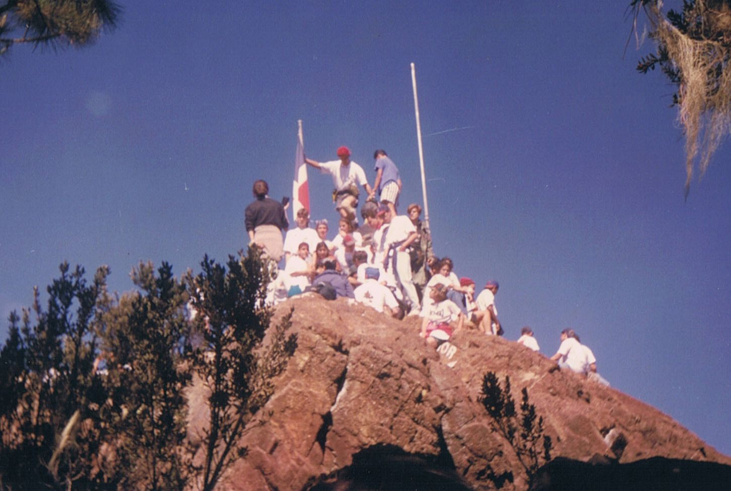 Pico Duarte